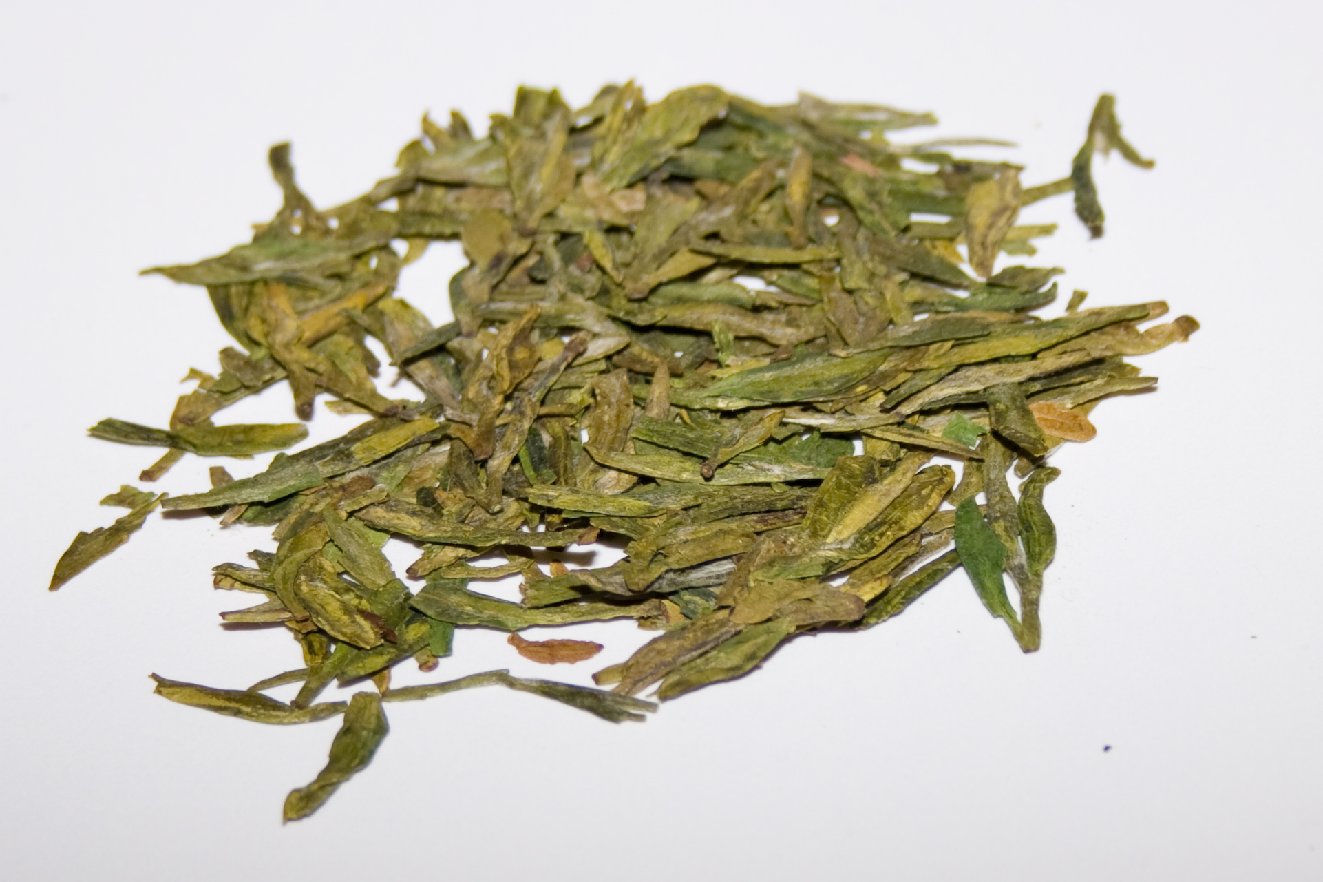 Dragon Well Tea Grade A